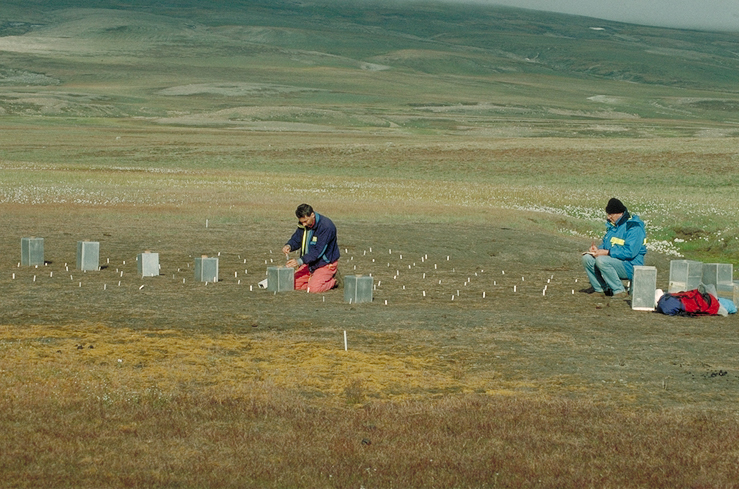 Forskning af drivhusgasser ved Zackenberg